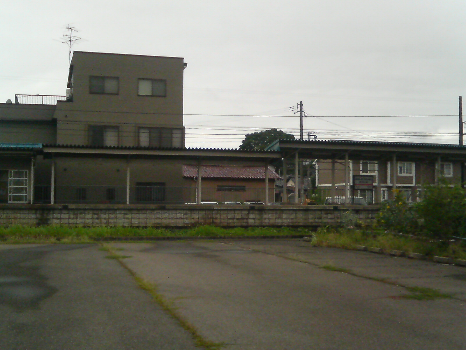 北陸鉄道石川線・野々市工大前駅を2006年9月5日投稿者自身が撮影。